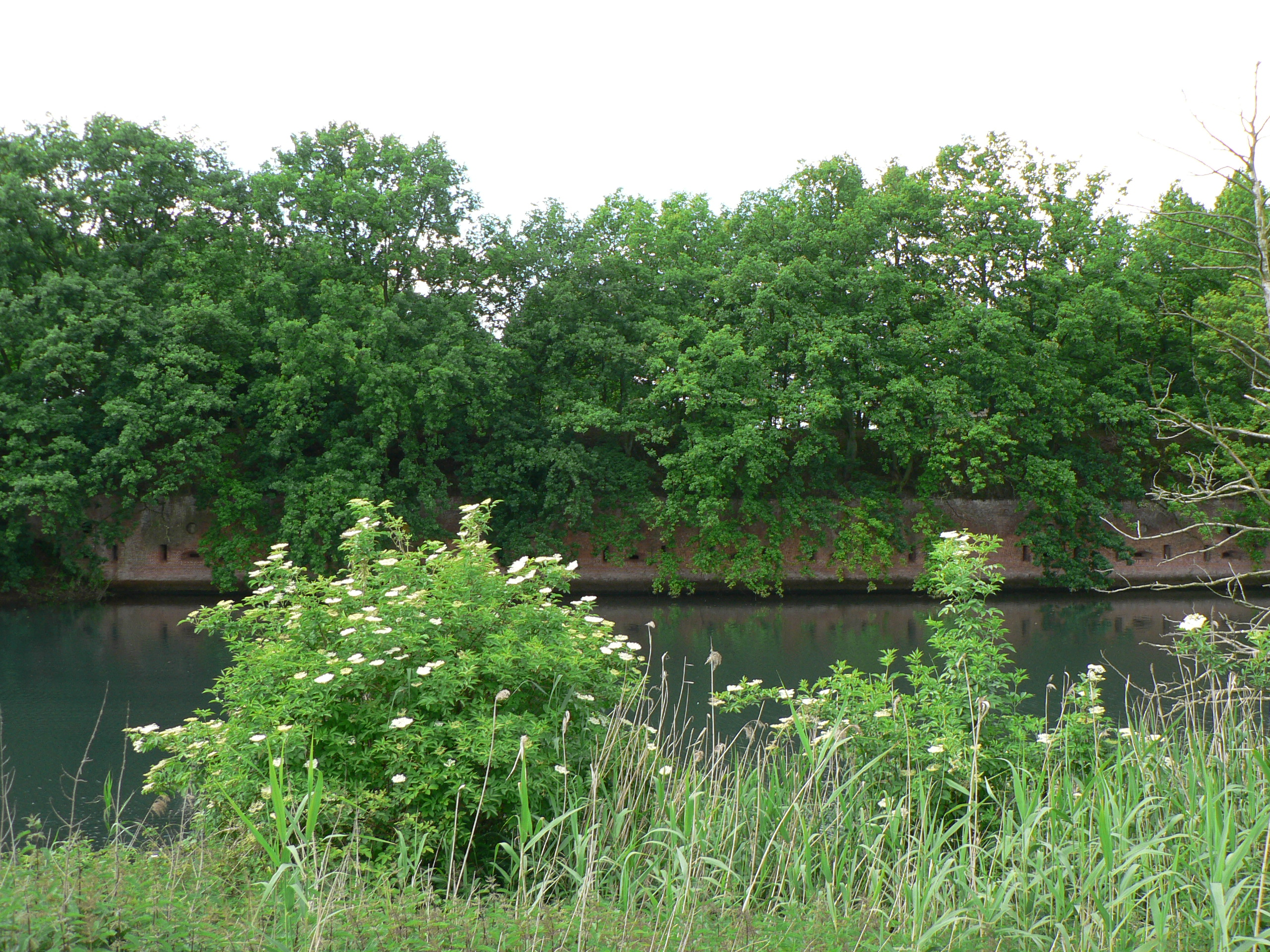 Fort III, Borsbeek, Antwerpen, Belgium